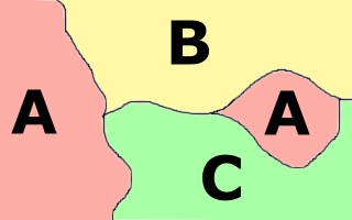 Schéma exklávy Zdroj: nakreslené - Vladimír Tóth Dátum: 17.12.2006 Autor: Ike - Vladimír Tóth Povolenie: PD Iné verzie tohto súboru: Nie